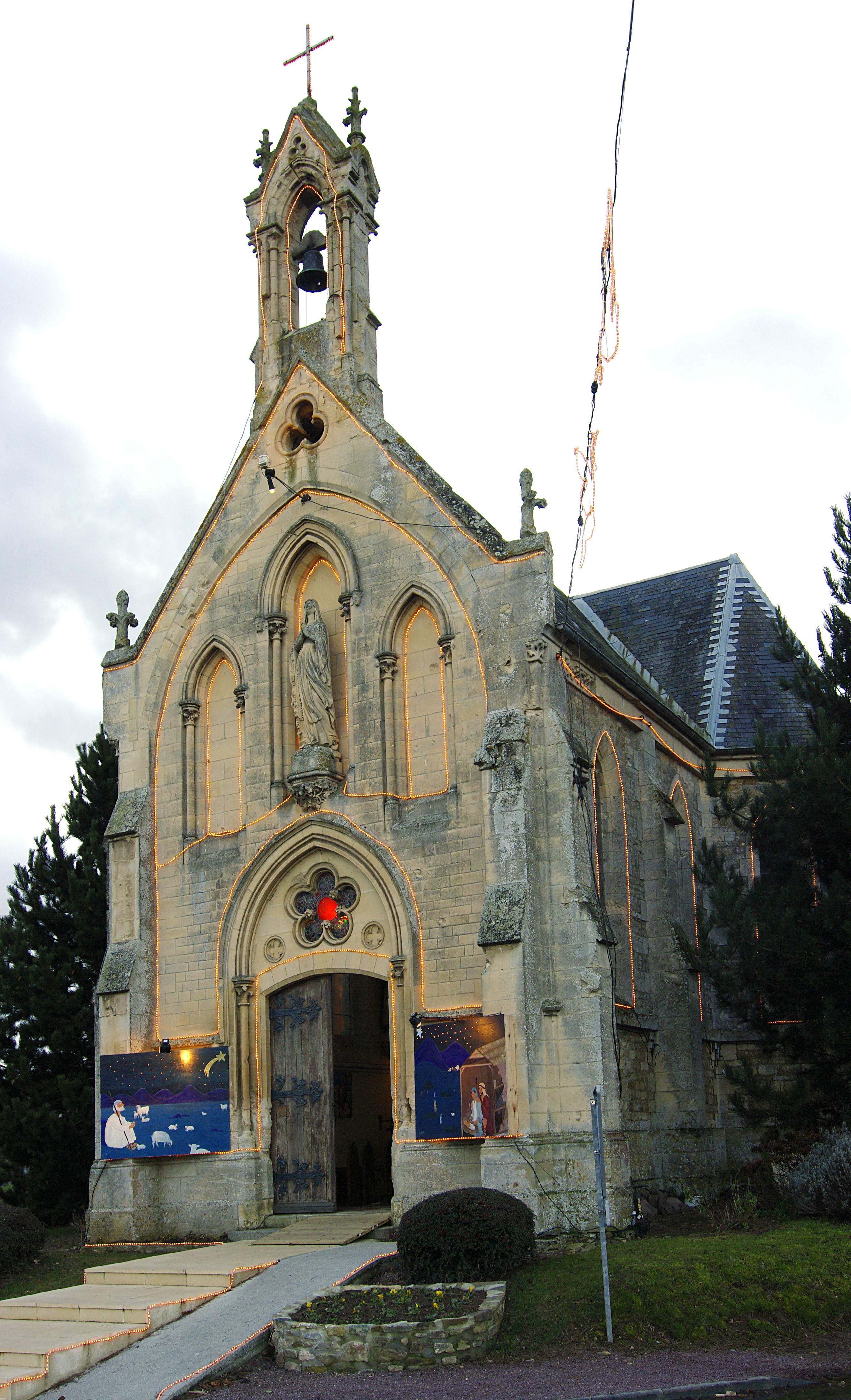 La chapelle Notre-Dame de Lourdes (carrefour de la Jalousie) à Sainte-Honorine du Fay.